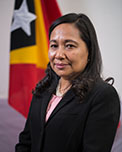 Maria Angélica Rangel da Cruz dos Reis, Abgeordnete des Nationalparlaments Osttimors